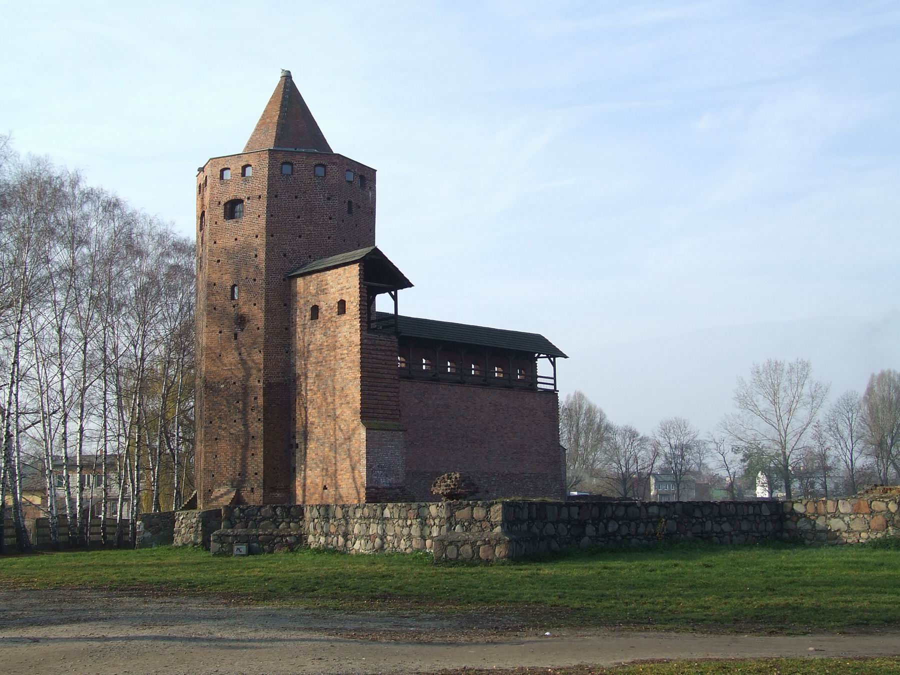 Ruiny zamku książąt mazowieckich, Rawa Mazowiecka, ul. Zamkowa